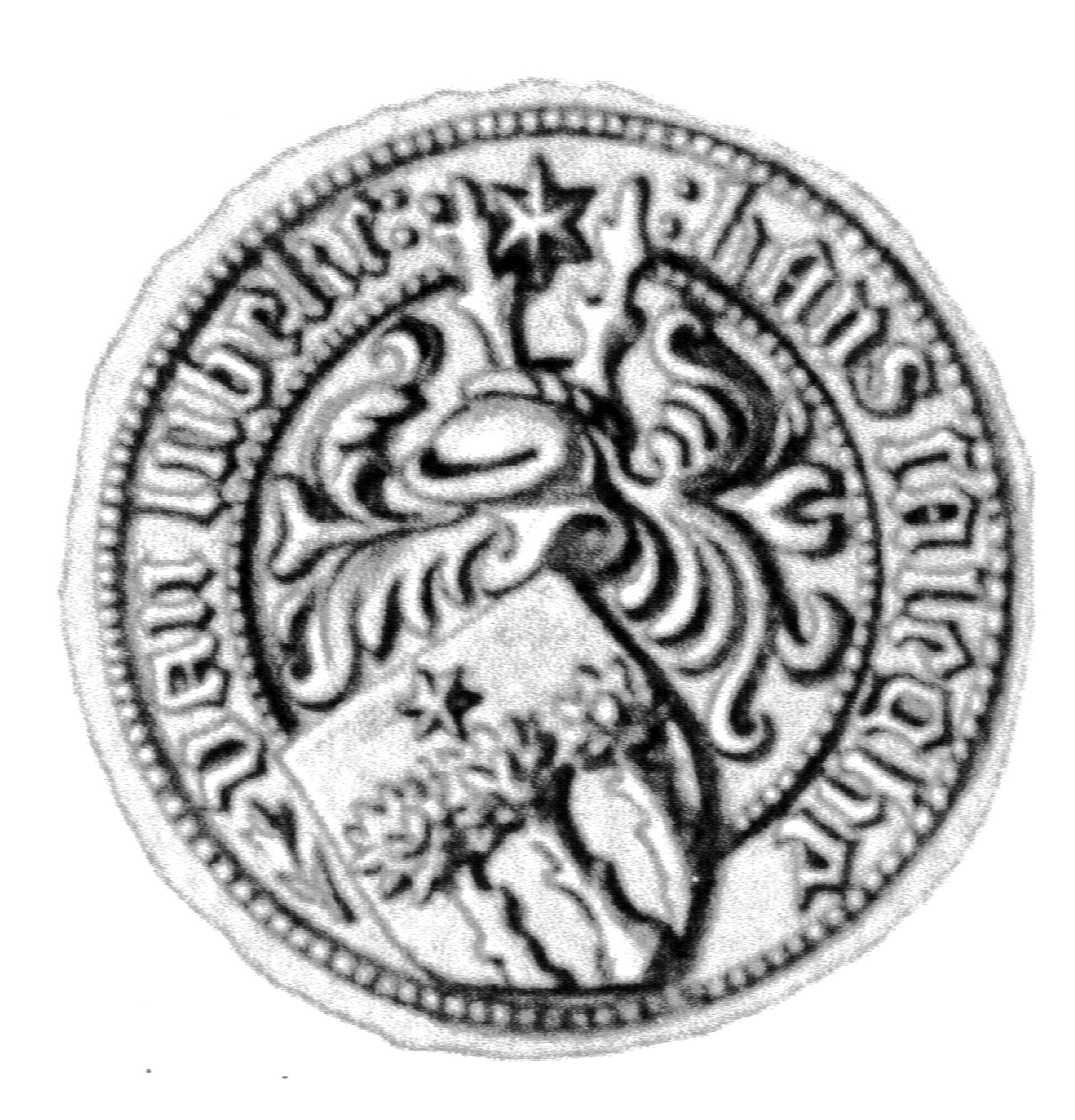 Siegel des Ratsmannes Hans Saleghe. Das Siegel stammt aus der Zeit um 1516.Siehe Emil Ferdinand Fehling: Lübeckische Ratslinie, Nr. 606 (Johann Salige).